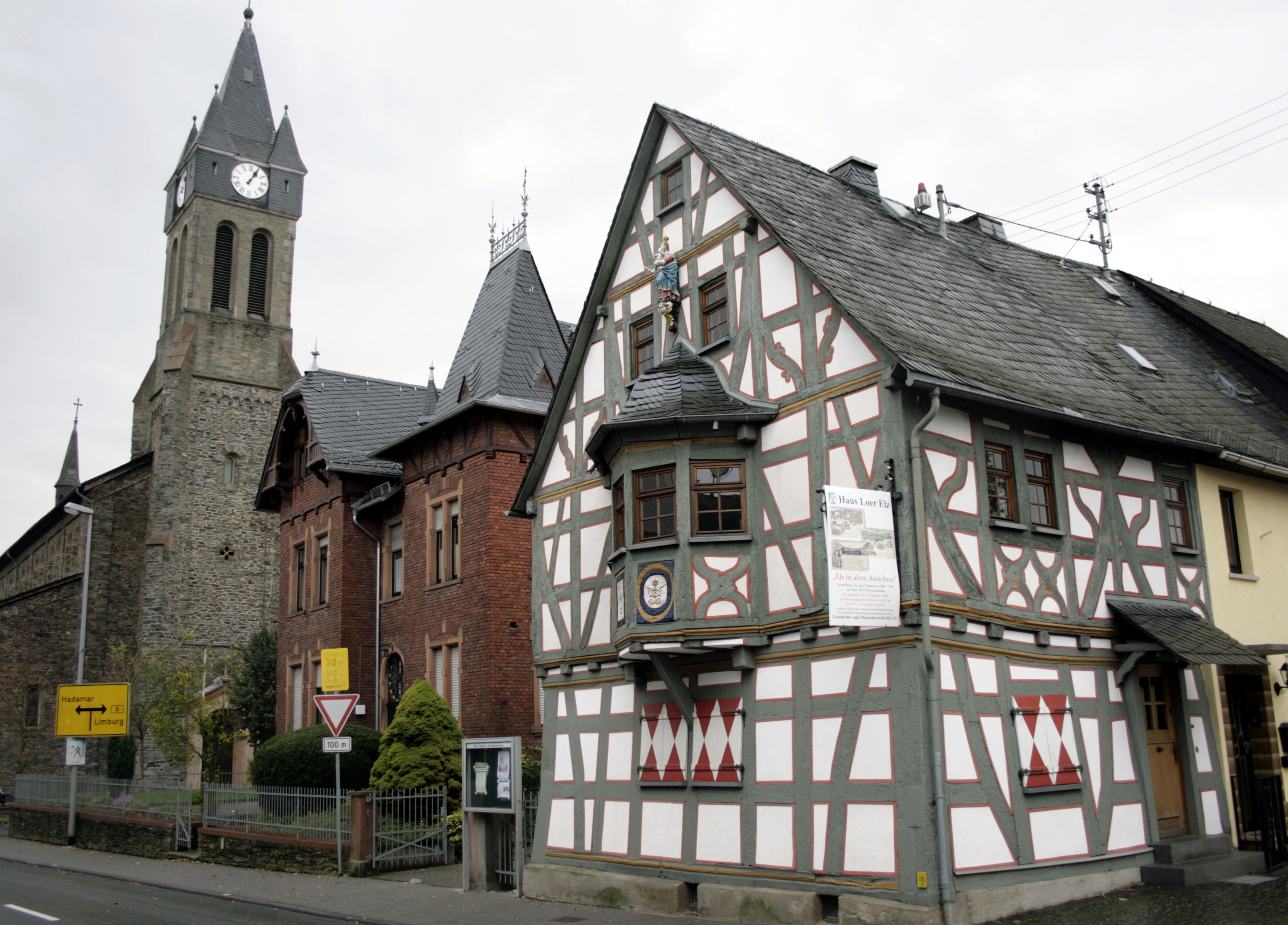 Heimatmuseum "Haus Loer" in Elz, Deutschland